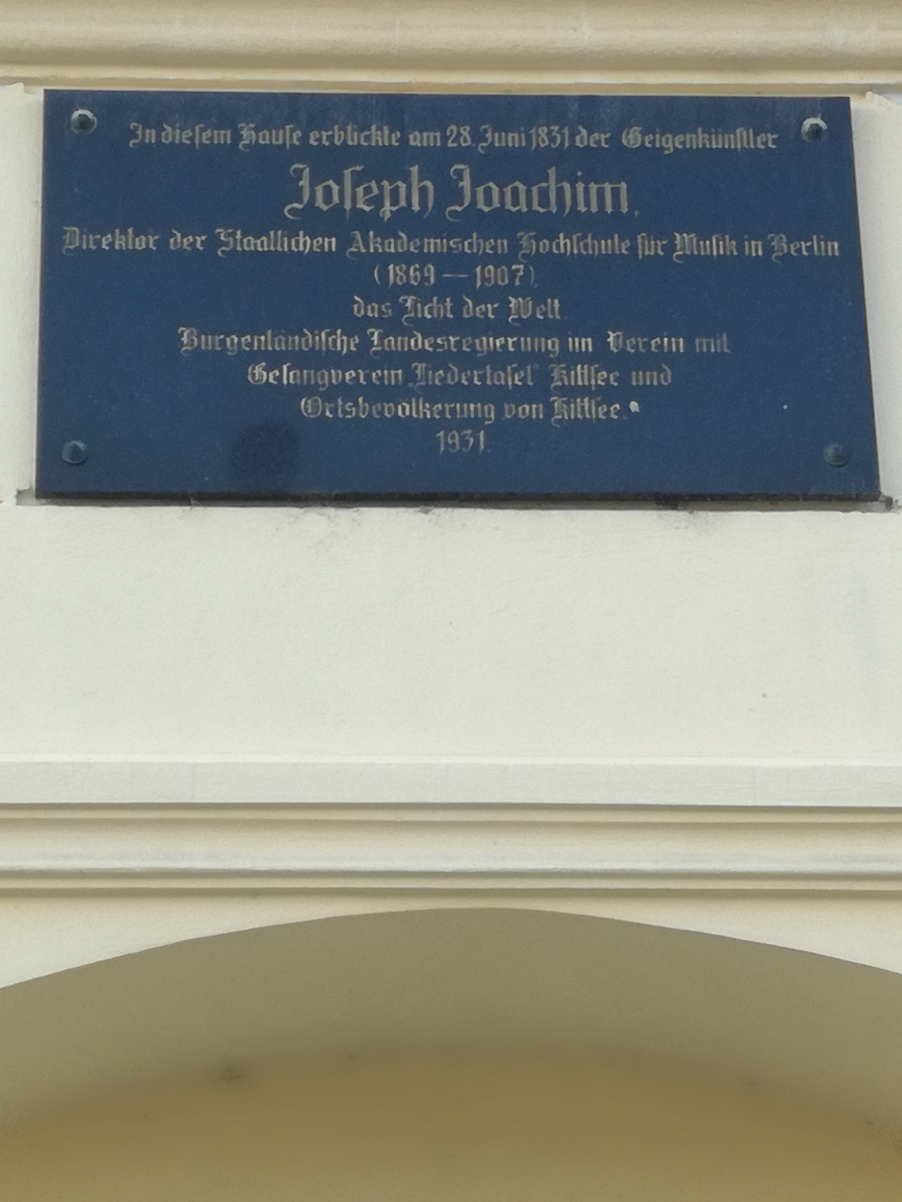 Joachim József szülőháza falán látható emléktábla